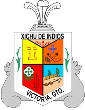 dibujo Escudo de armas del municipio de Victoria, Guanajuato en México.